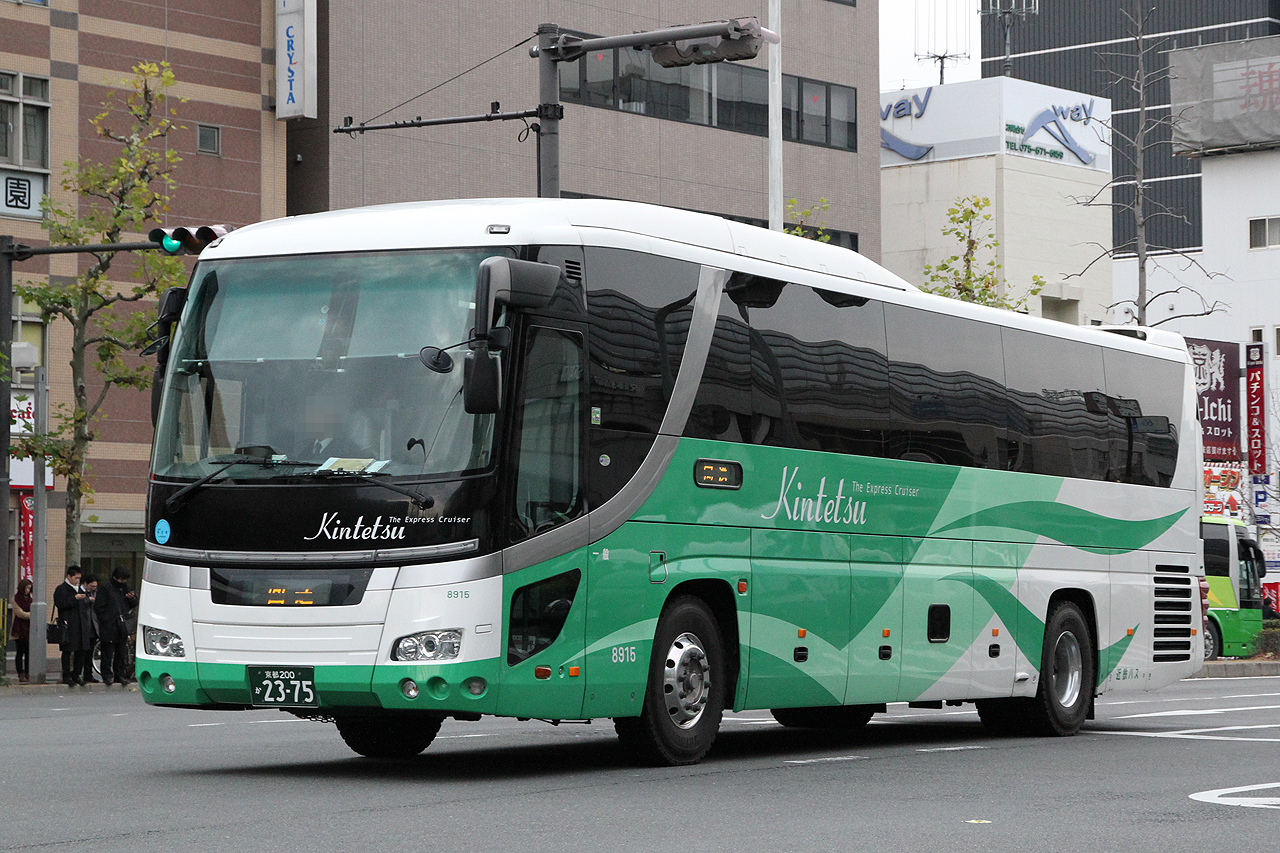 登録番号 京都200か23-75 近鉄バス㈱京都営業所所属 夜行高速路線用車両 2012年1月 京都駅八条口にて撮影 撮影者 Zondag2000